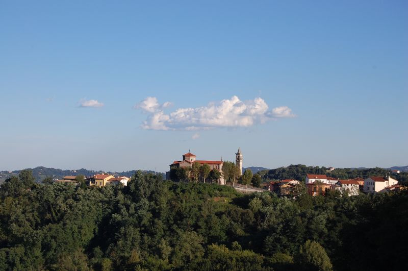 Monteviale, panorama con chiesa dell'Assunta.